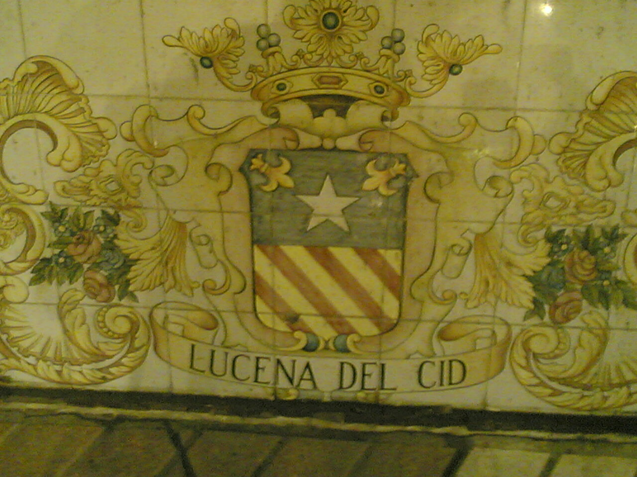 Escut de Llucena del Cid, trobat a la plaça de maria agustina a Castelló de la plana (País Valencià)